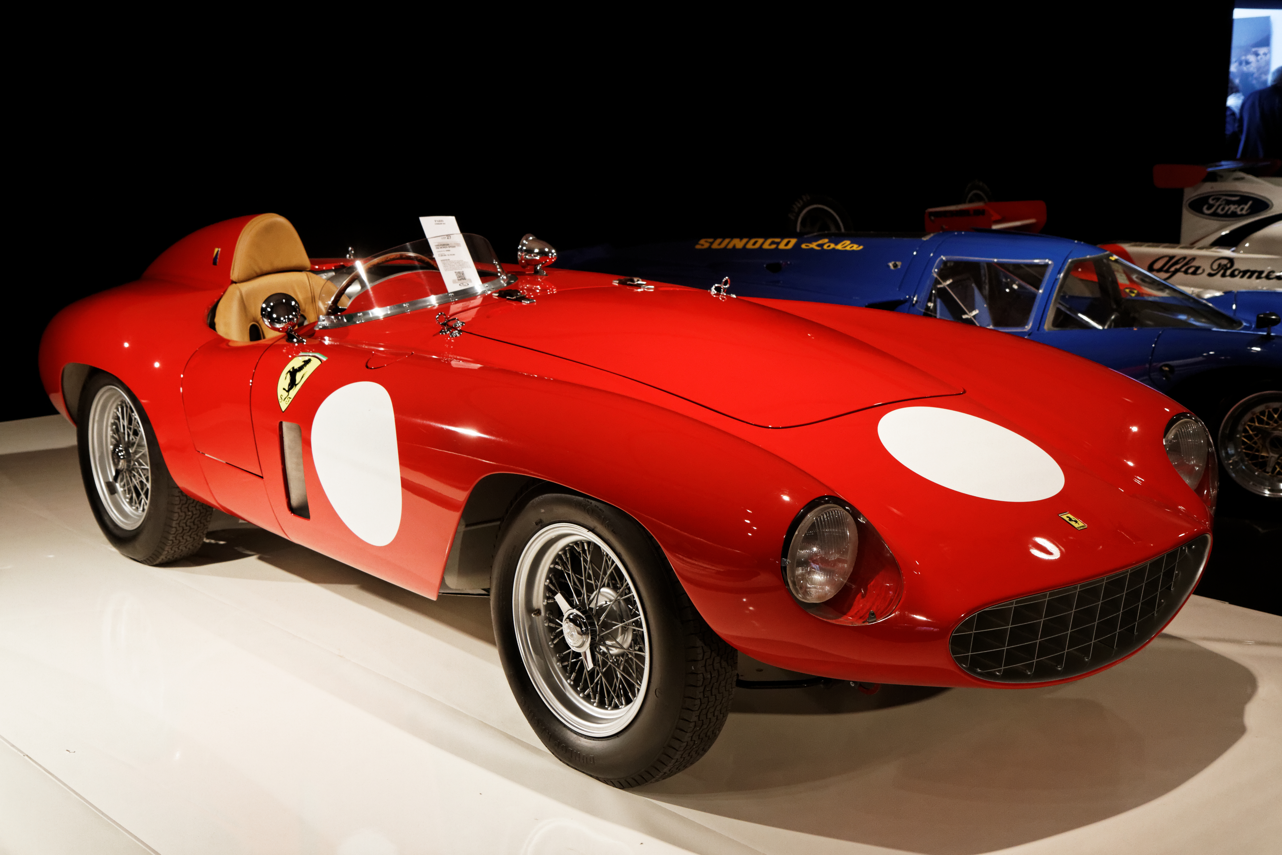 Une Ferrari Monza Spider de 1955.